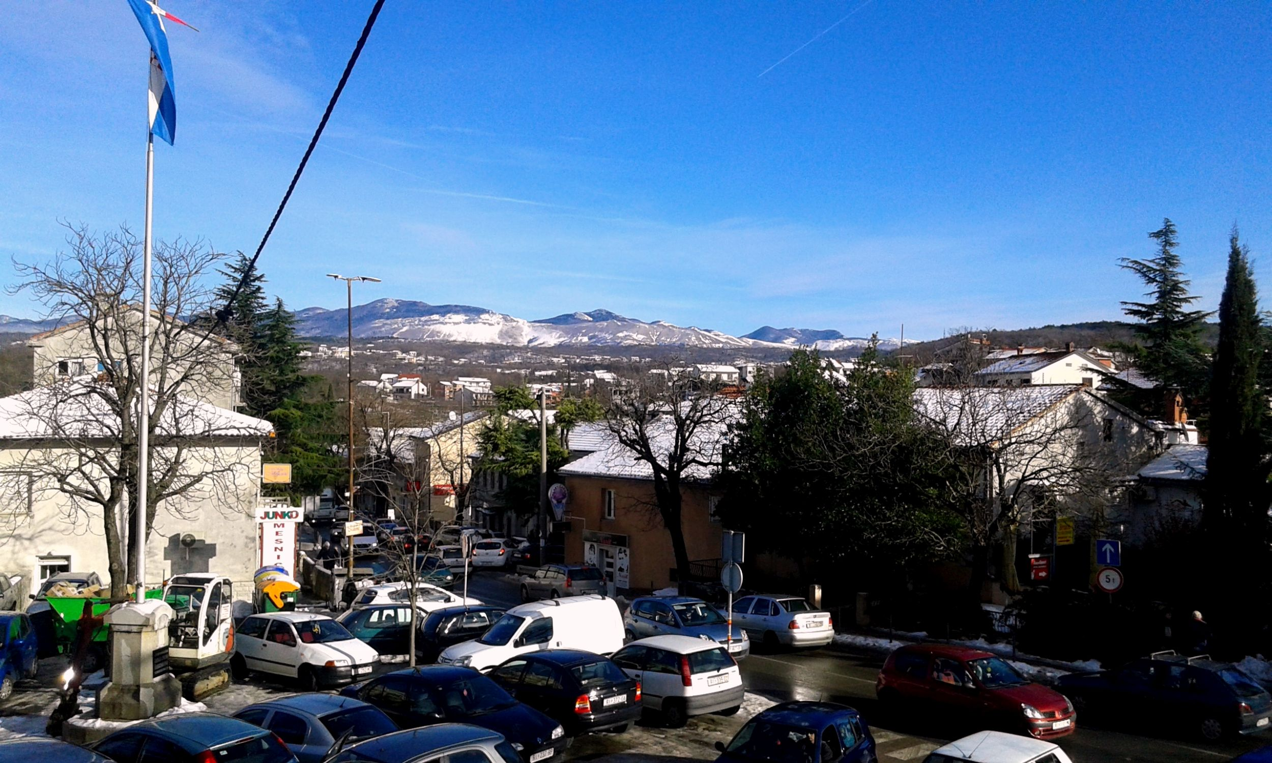 Viškovo - view of the mountain in Slovenia